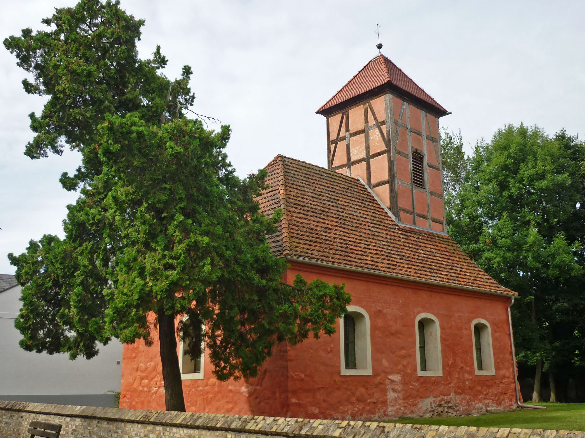 Dorfkirche in Kemnitz bei Werder (Havel)